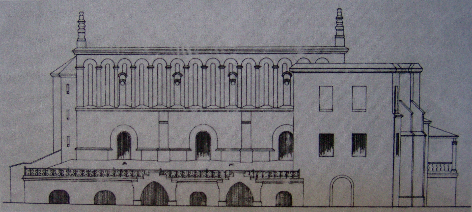 Projekt przebudowy więźby dachowej oraz restauracji attyki Starej Synagogi w Krakowie (1913)